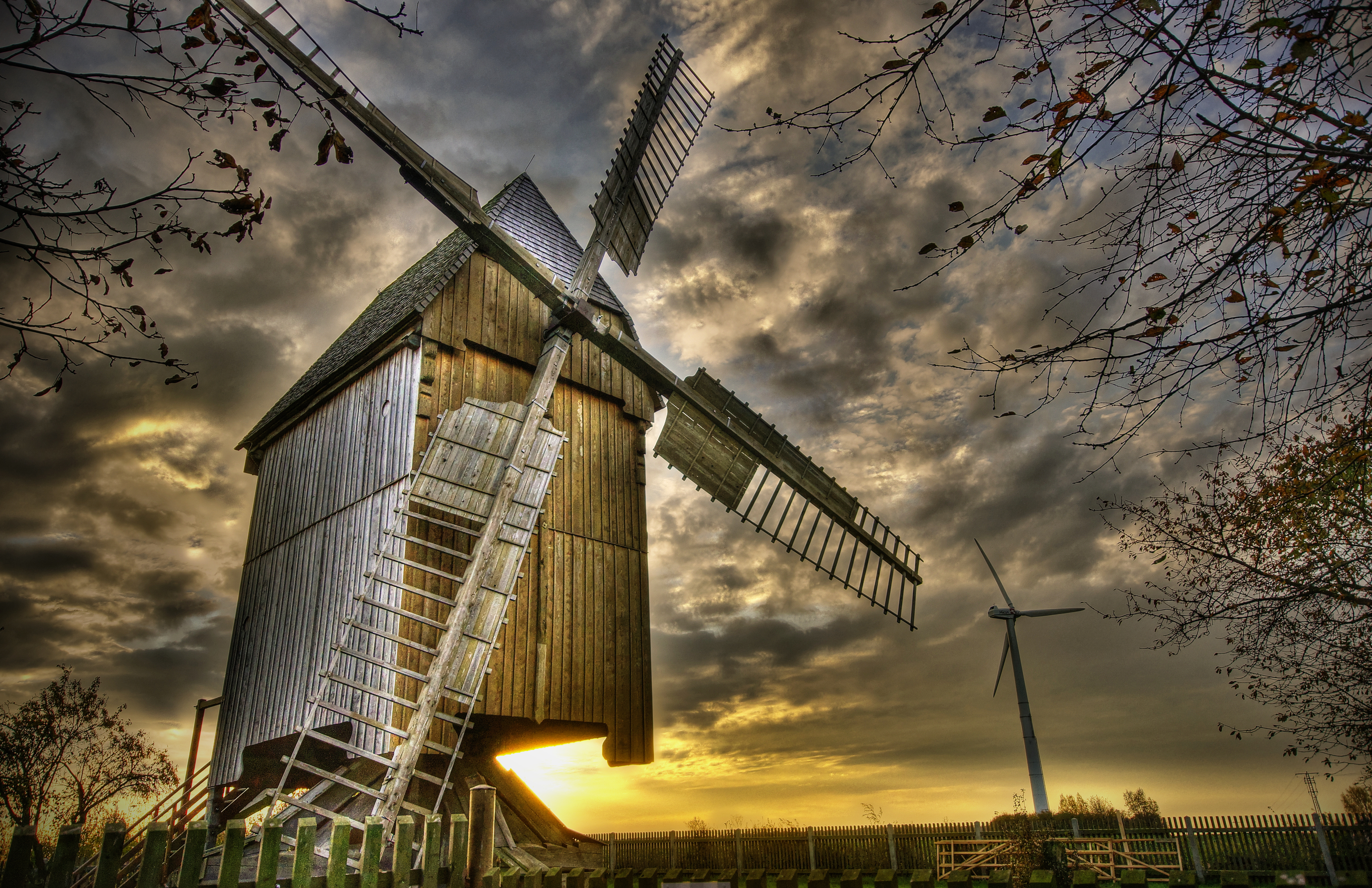 Die einzig erhaltene Bockwindmühle des Altenburger Landes in 04626 Lumpzig Ortsteil Hartha, Dobraer Weg 3 Im herbstlichen Sonnenaufgang.